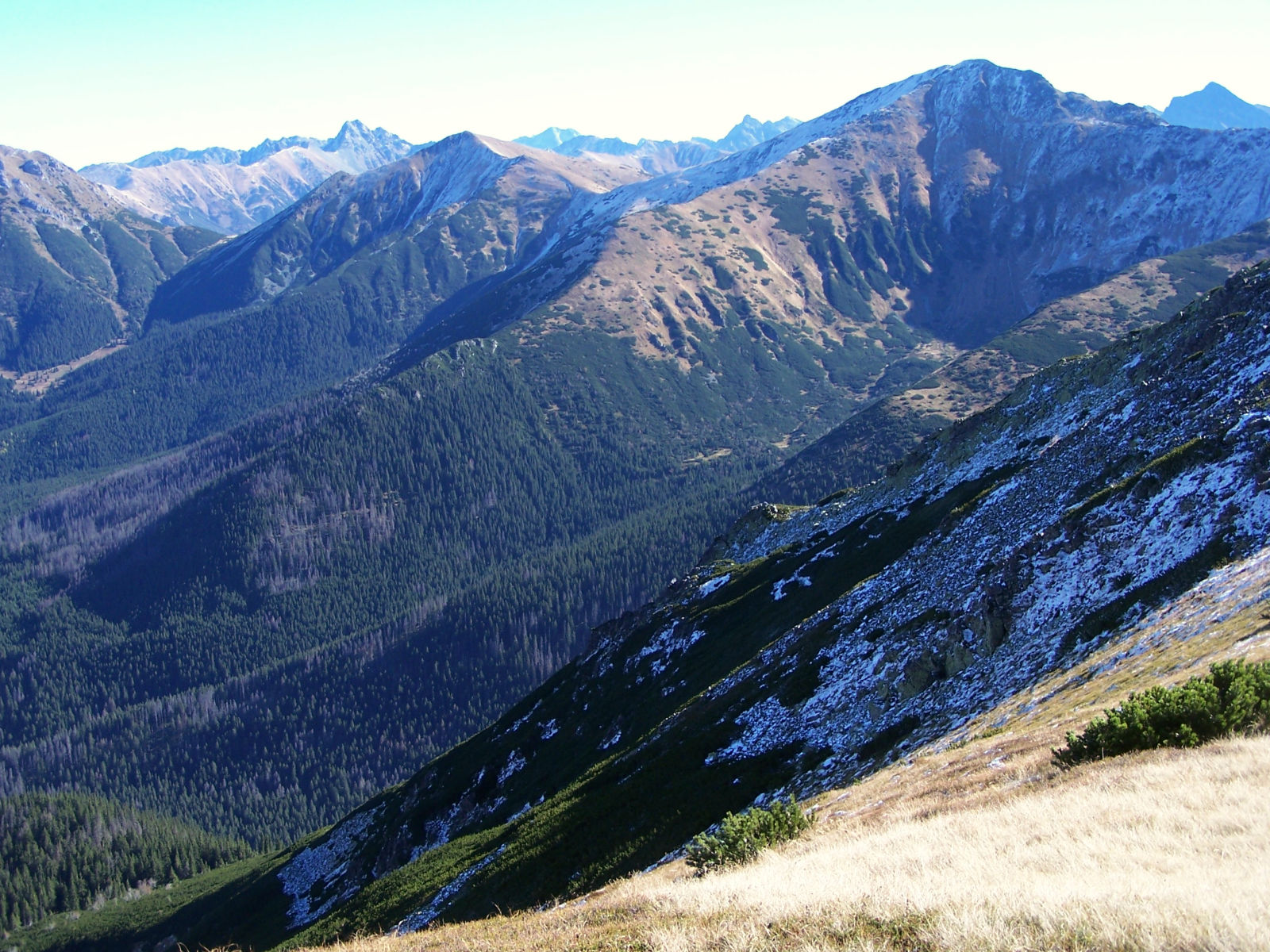 Dolina Tomanowa, Dolina Pyszniańska (West Tatra Mountains)